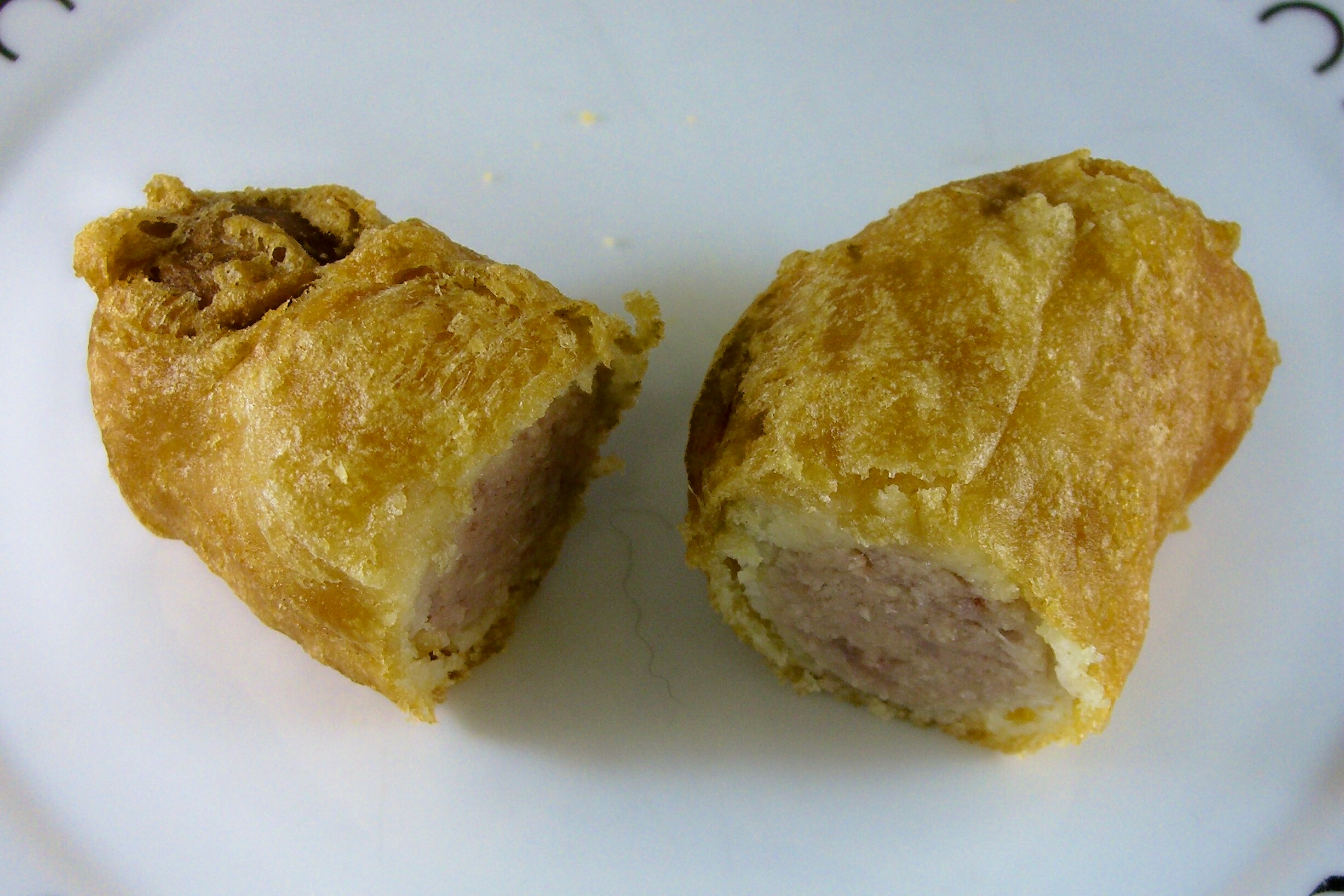 Battered sausage